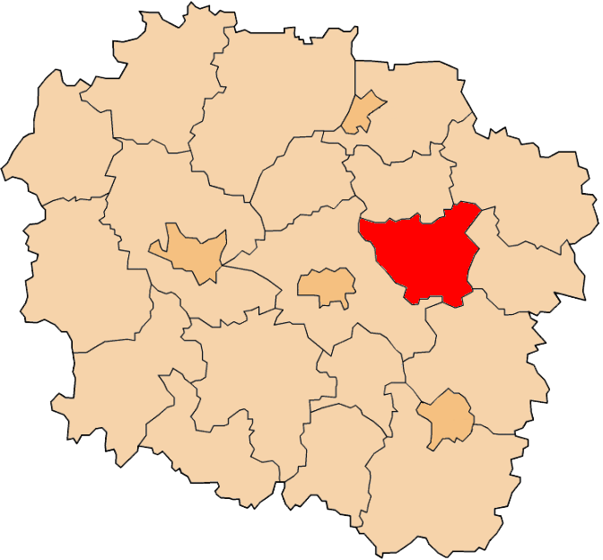 Powiat golubsko-dobrzyński na mapie województwa kujawsko-pomorskiego.